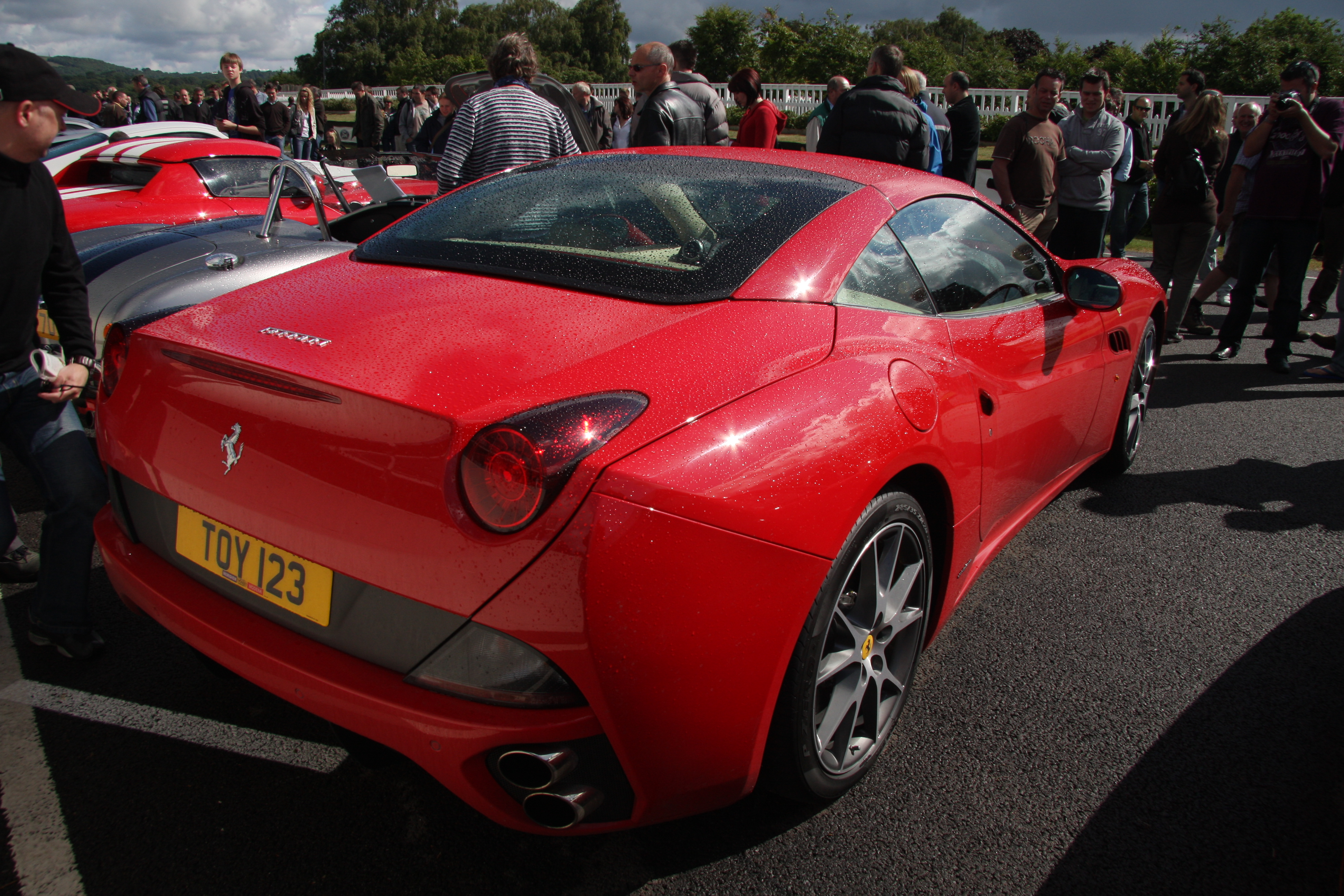 Ferrari California